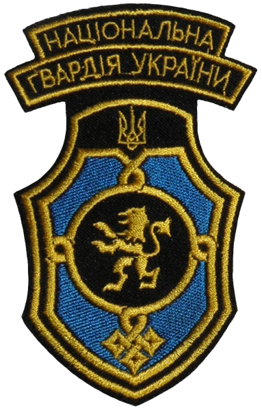 Нарукавний знак 5-ї Західної дивізії Національної гвардії України.